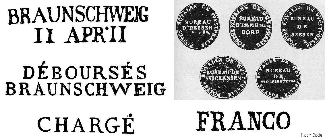 1808, Stempel der Königlich Westfälischen Post